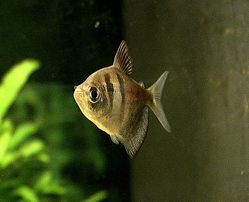 veuve noire male